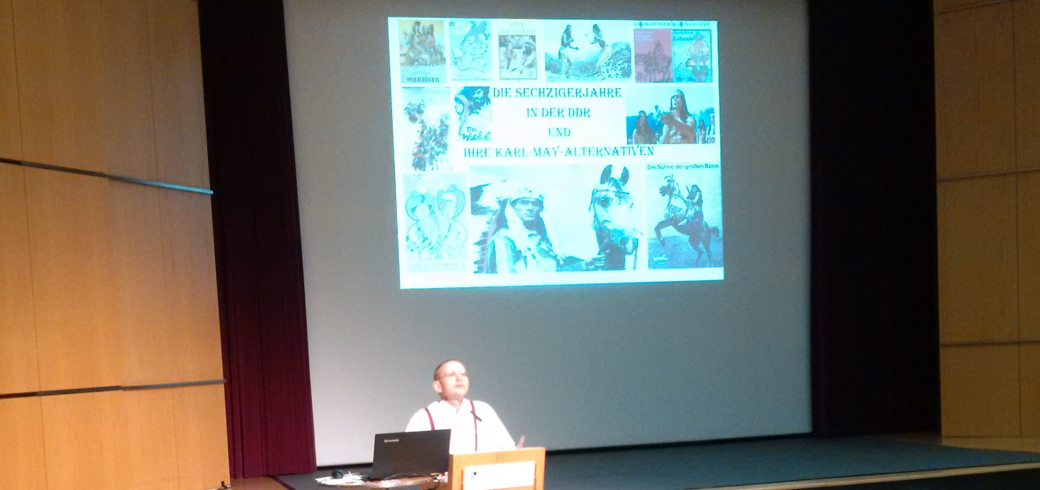 Thomas Kramer bei einem Vortrag im Haus der Geschichte Bonn anlässlich eines Symposiums der Karl-May-Gesellschaft.